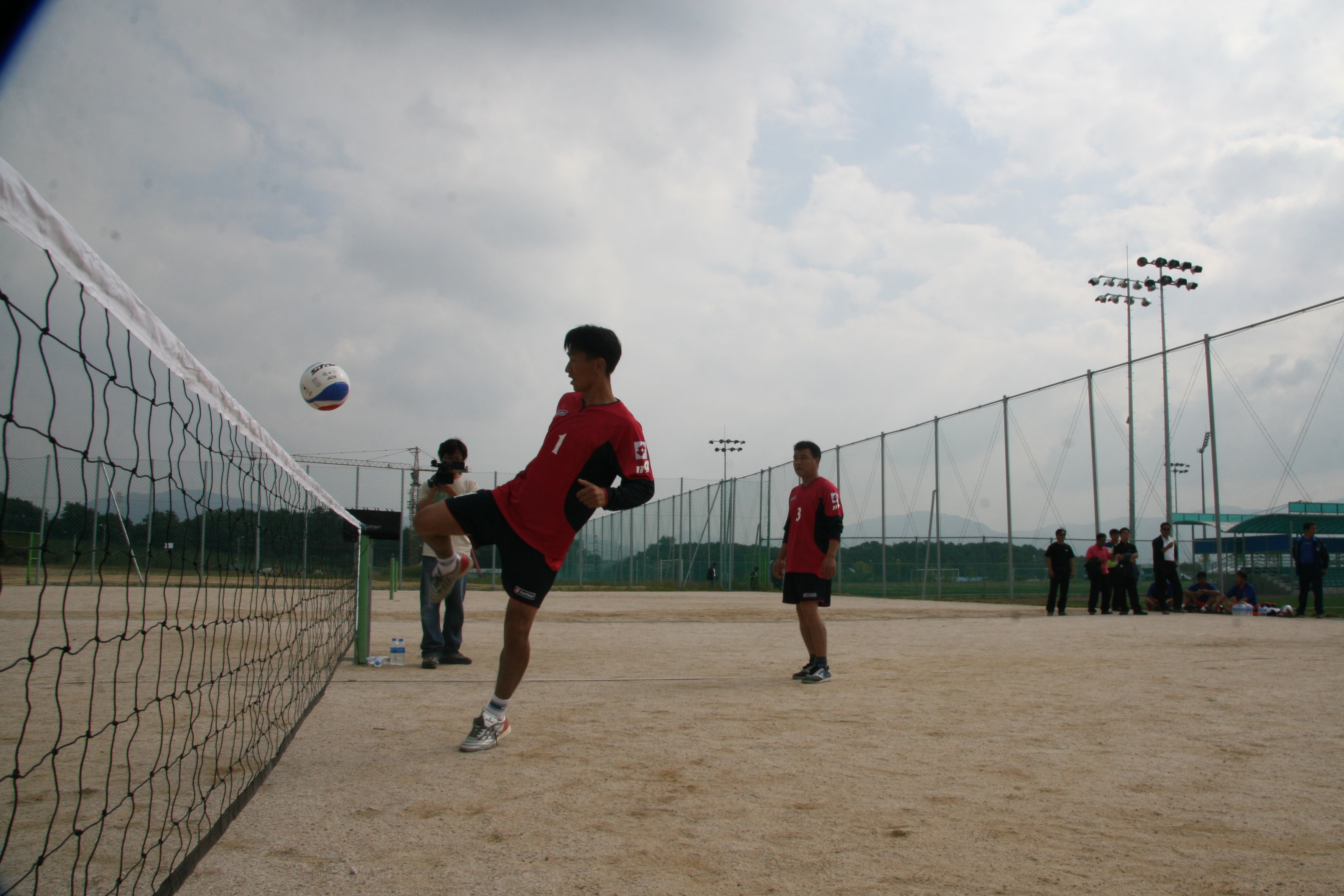 081013경기도소방 체육대회 예선